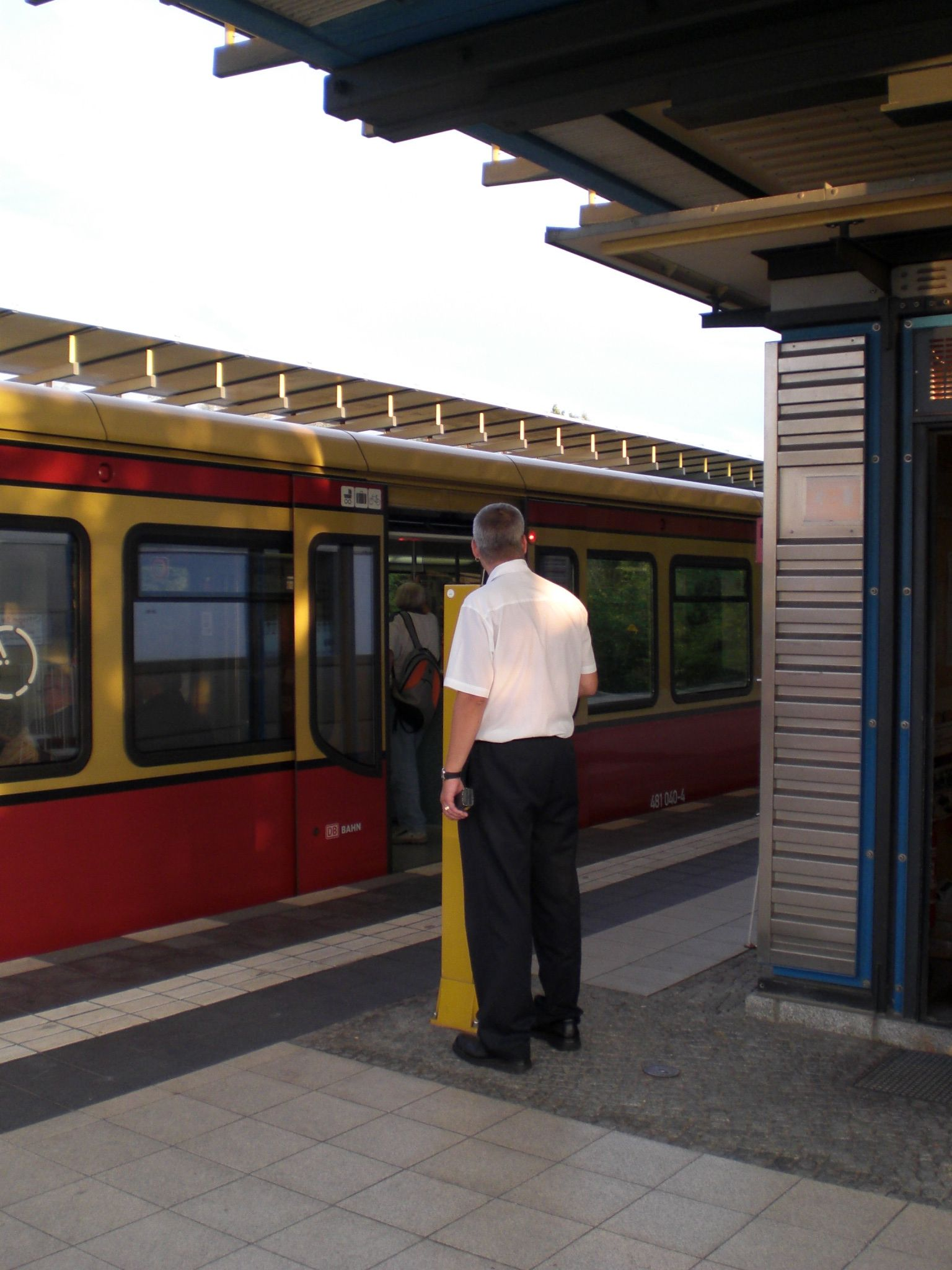 Aufsicht fertigt Zug bei der S-Bahn Berlin ab (S-Bahnhof Priesterweg)